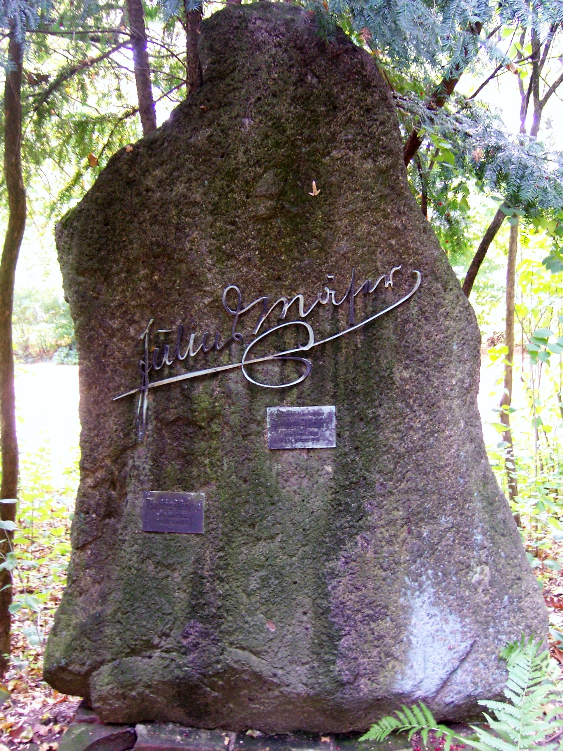 Grabstätte Julius Mäser und Angehörige